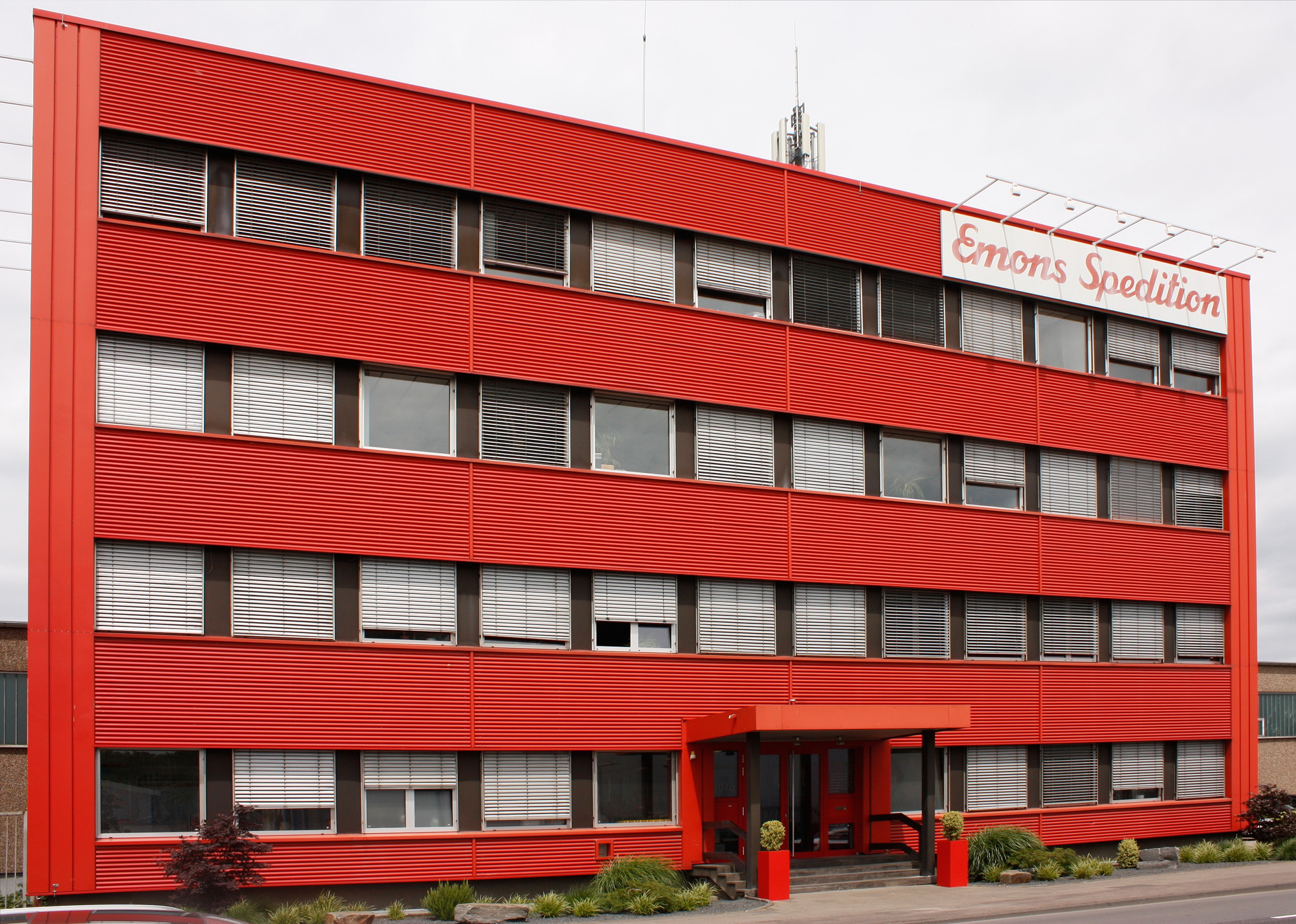 Die Unternehmenszentrale der Emons Spedition in Köln